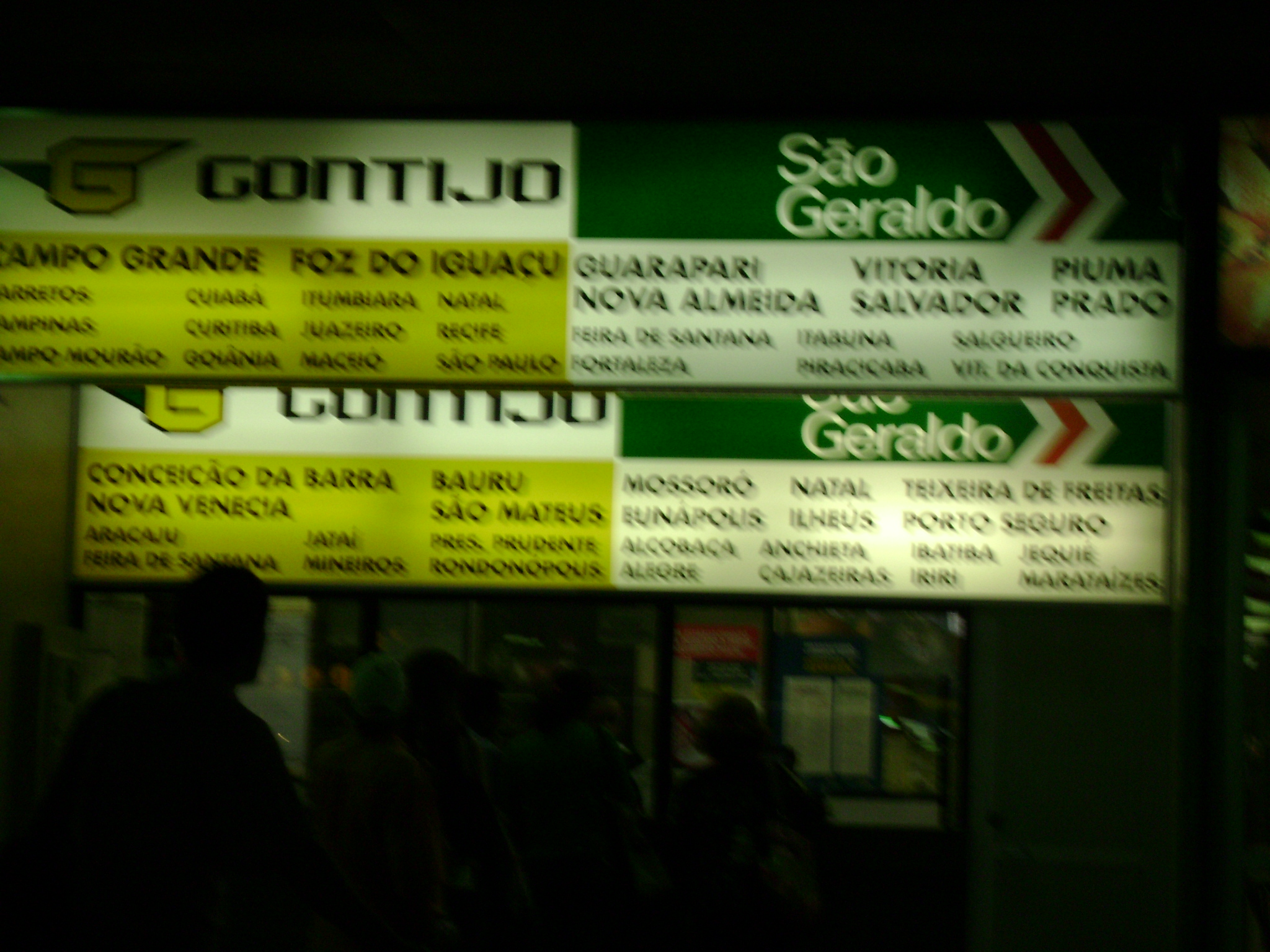 Inscrição da Gontijo e São Geraldo, no guichê da empresa